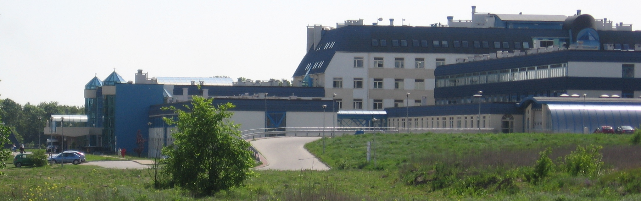 Akademicki Szpital Kliniczny przy ulicy Borowskiej we Wrocławiu, widok z ul. Działkowej